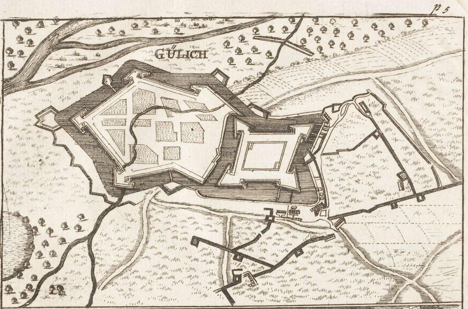 Gülich, engraving from: Martialischer Schau-Platz/ Des Lustreichen und zuglich blutigen Rhein-Strohms : Worinnen Alle Kriege/ Bataillen/ Scharmützel und Schlachten/ ... Verwüstungen/ derer Stadte/ Vestungen ... welche an beyden Ufern ... des Ober-und Nieder-Rheins/ ... bis .../ und einer ... Land-Charte ... ausgezieret, Hofmann, Nürnberg 1690